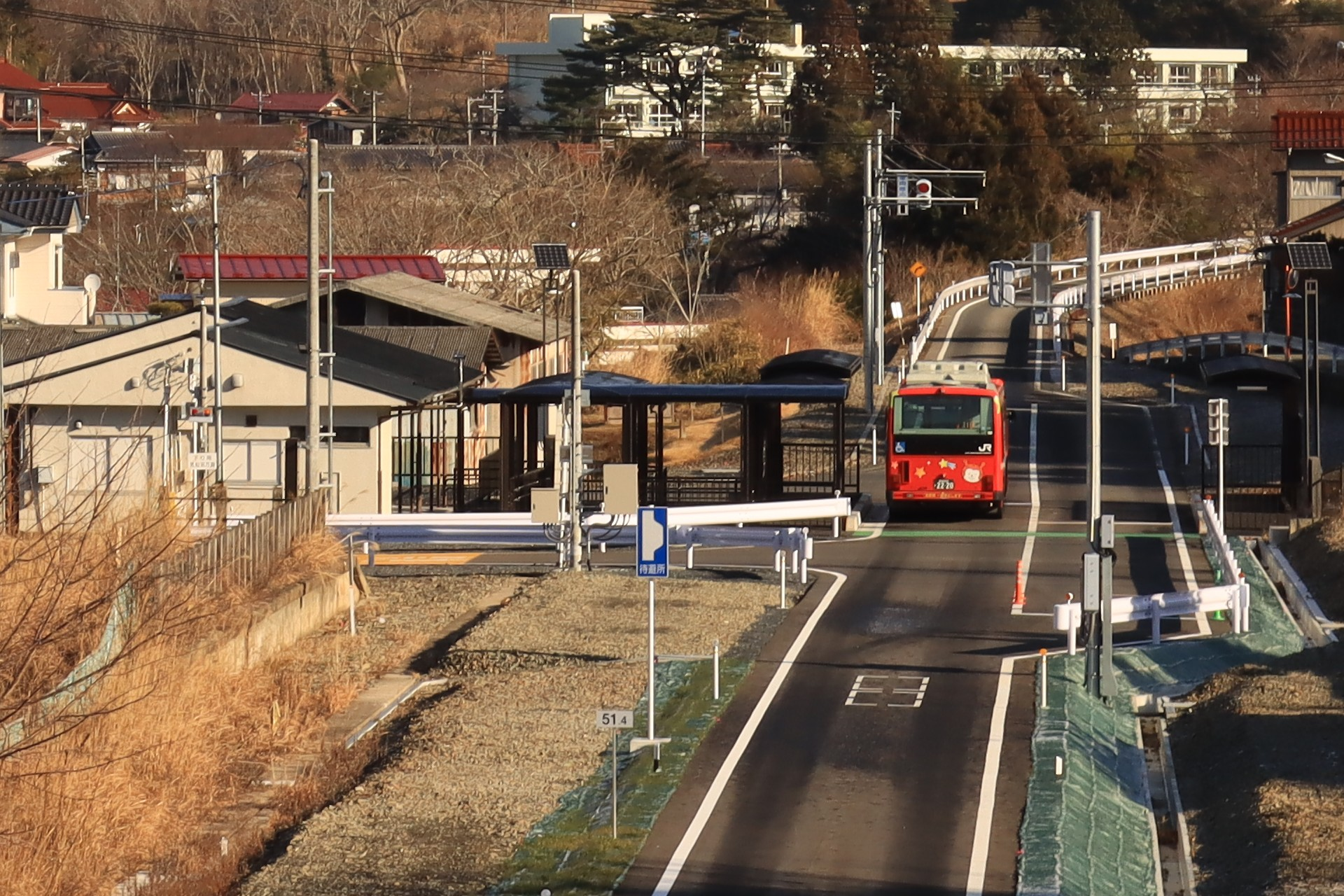 宮城県気仙沼市本吉町に所在する、JR東日本・気仙沼線BRTの本吉駅。2019年11月にホームが専用道へ移設された後（2019年12月）。